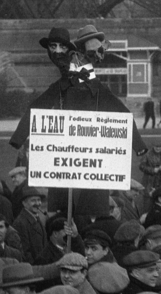 Le géant à deux têtes Rouvier-Walewski dans la manifestation des chauffeurs de taxis parisiens en grève en 1934. Détail d'une photo de l'agence Meurisse montrant le rassemblement des grévistes à la tour Eiffel